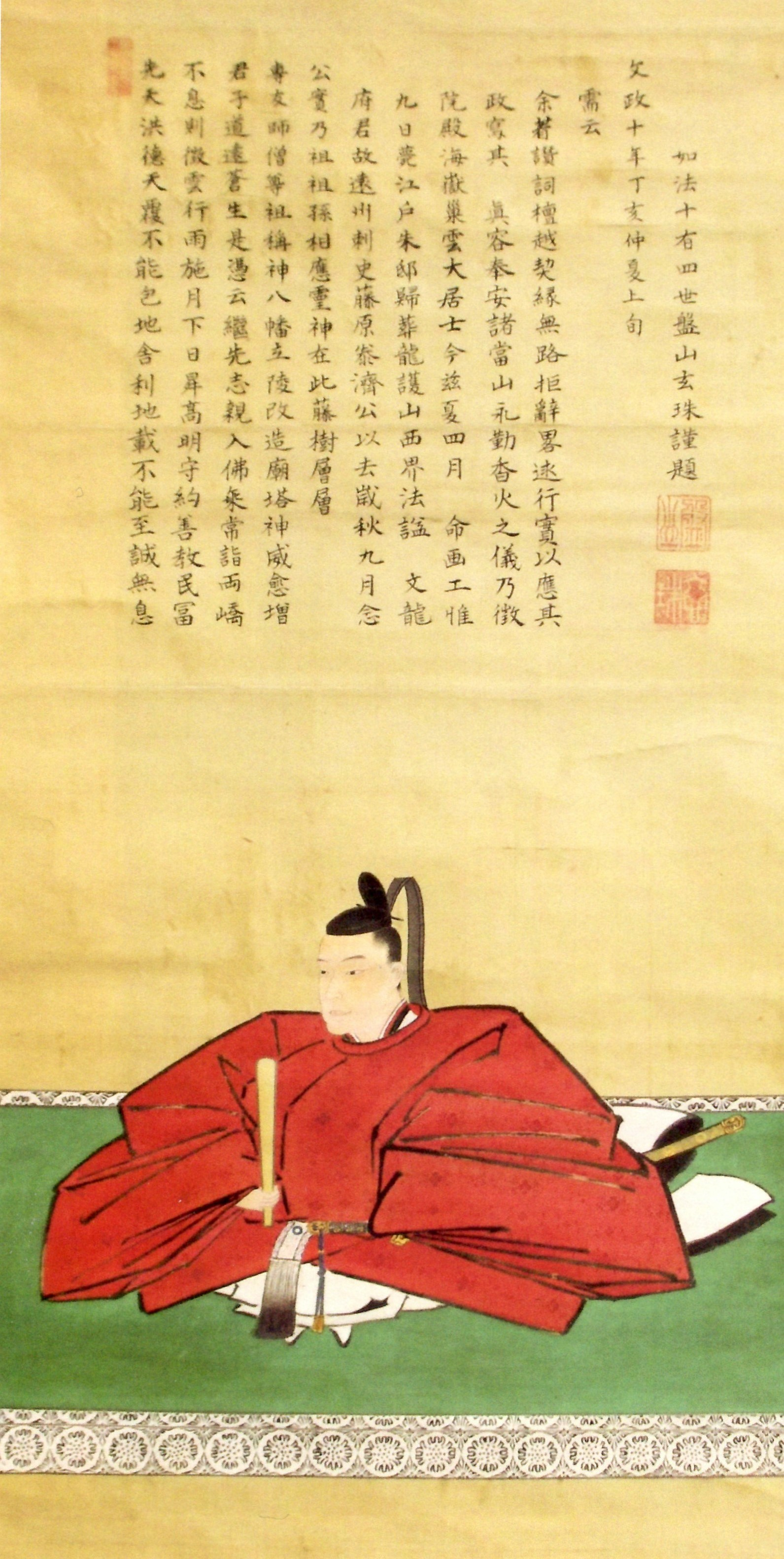 加藤泰済の肖像。